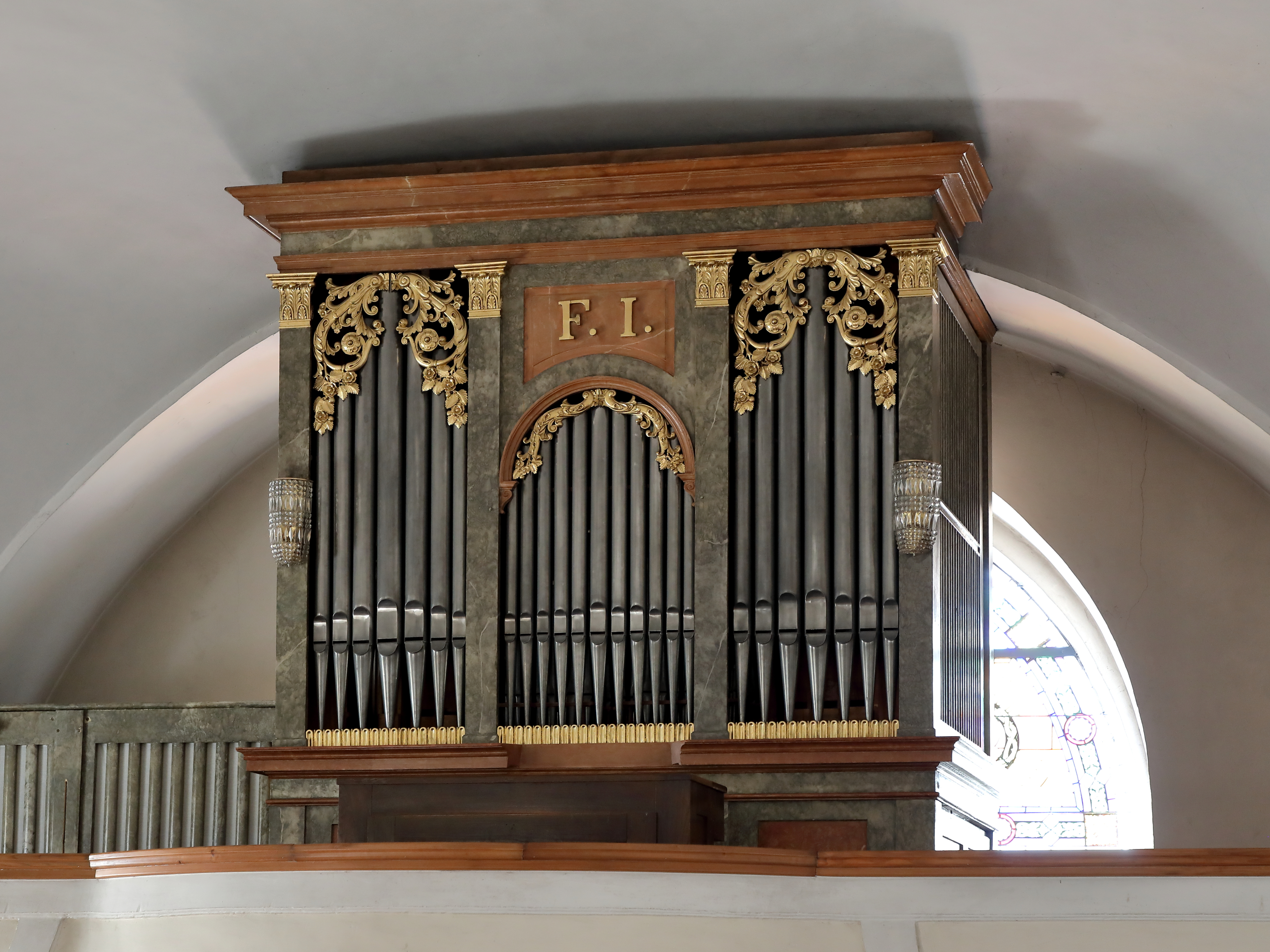 Orgel der röm.-kath. Pfarrkirche hl. Laurenz in der niederösterreichischen Gemeinde Haringsee.Die achtregistrige Orgel wurde von dem Wiener Orgelbauer Franz Ullmann gefertigt und 1840 feierlich eingeweiht. Sie war ein Geschenk von Kaisers Franz I. und man hat daher seine Initialen „F. I.“ auf dem spätklassizistischen Prospekt verewigt. 1966 baute man in die in ihrer ursprünglichen Ausstattung erhaltenen Orgel ein elektrisches Gebläse ein.